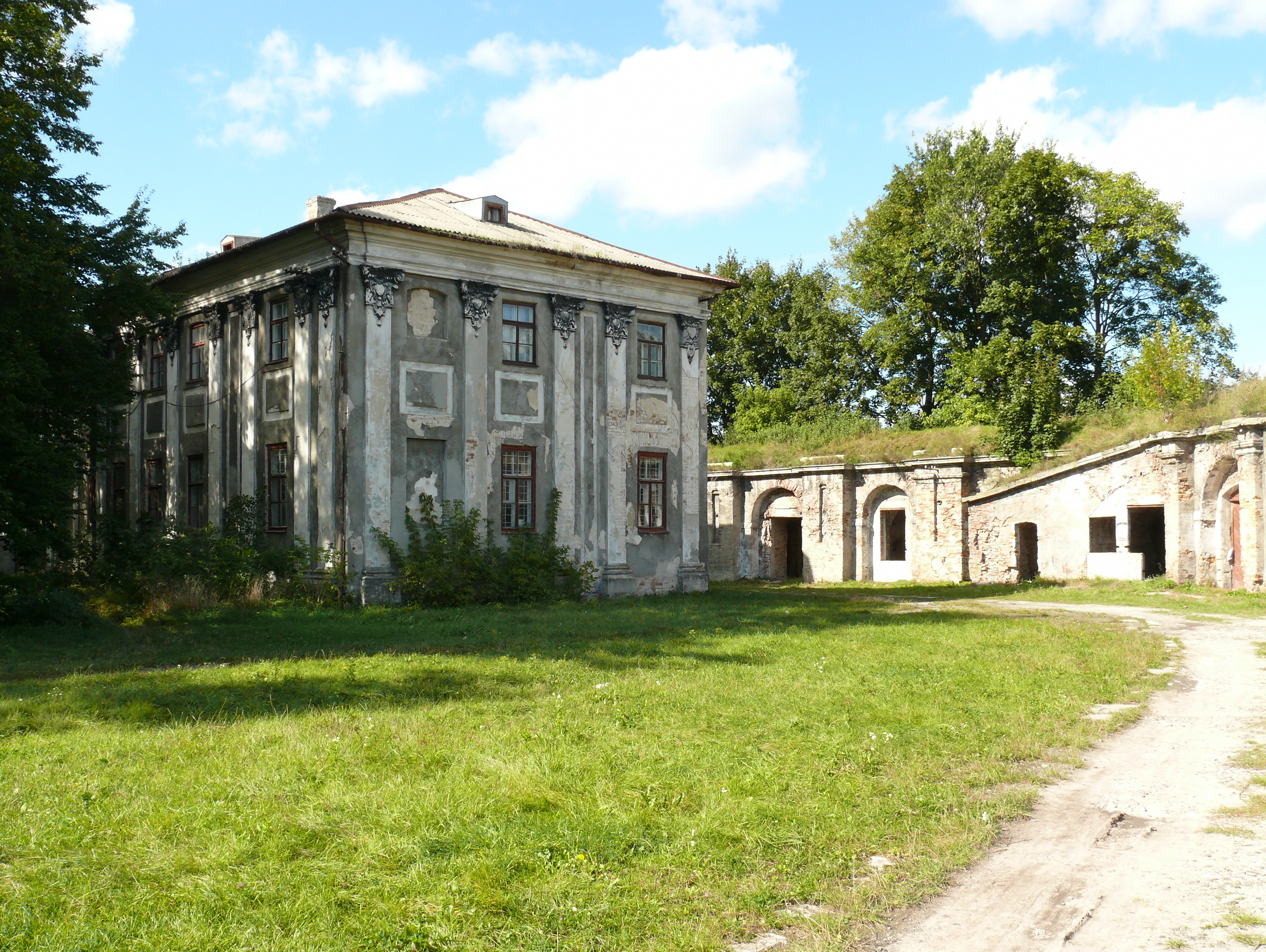 Замок (мур.) 1630-1635 рр. Броди,вул.Шкільна, 13